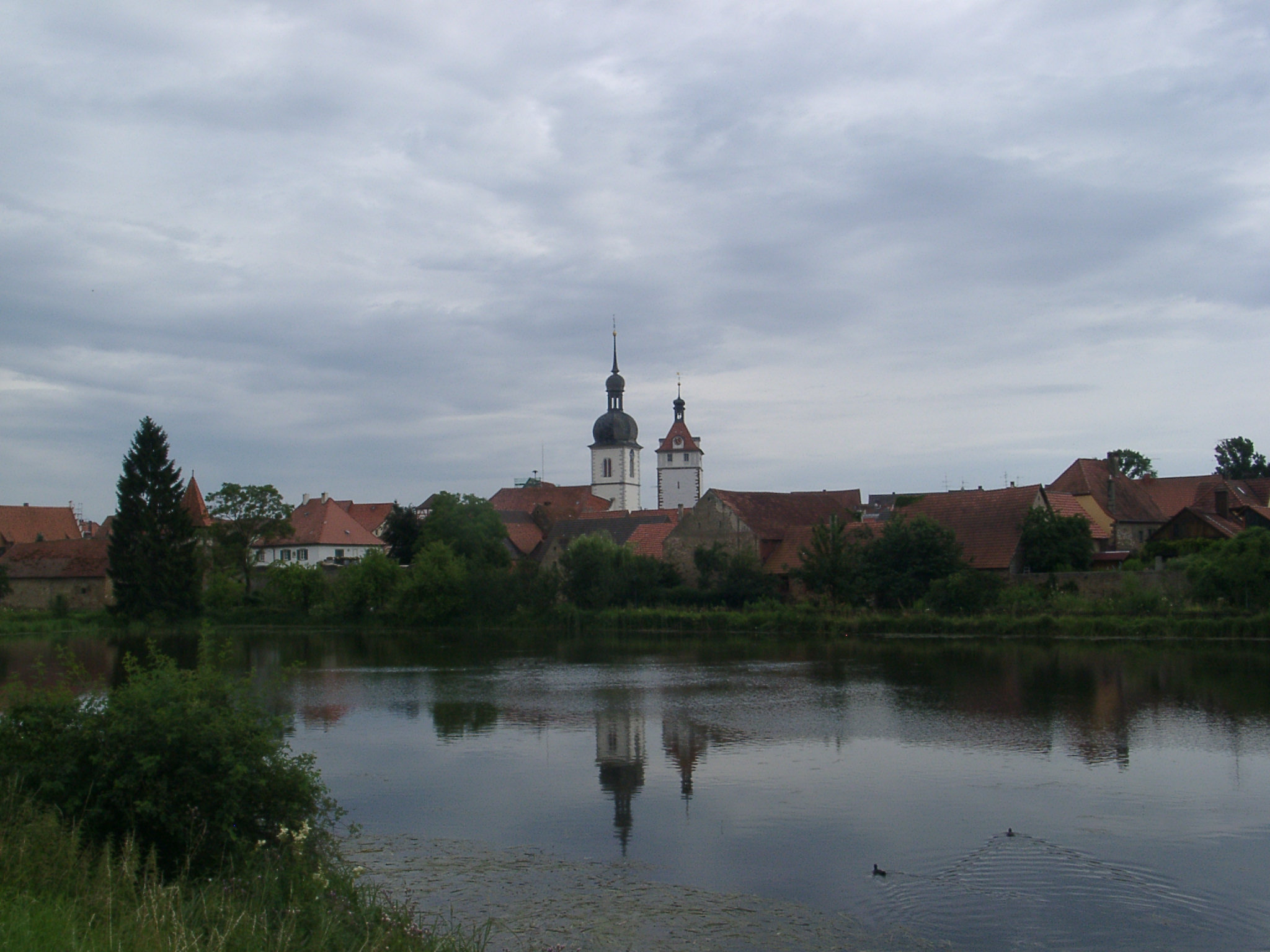 Prichsenstadt